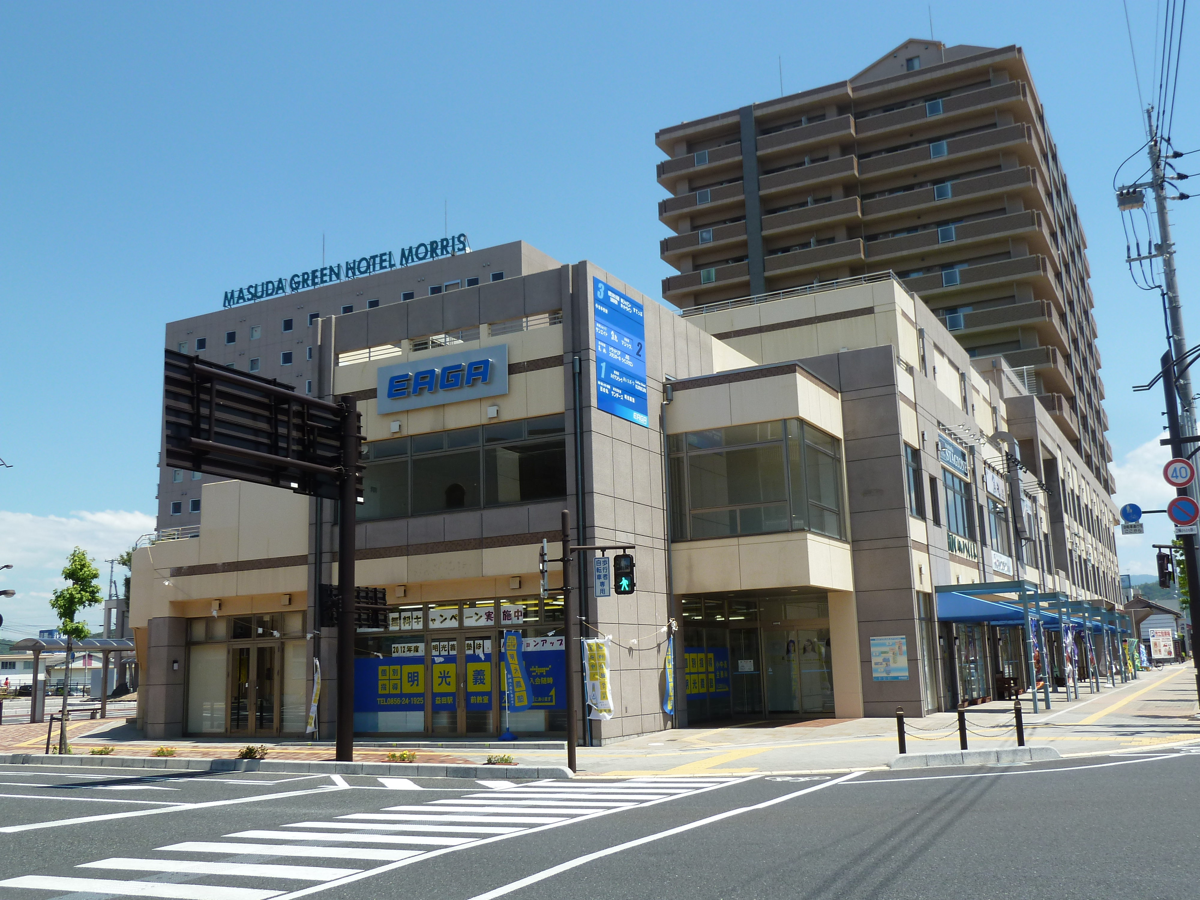 益田駅前EAGE